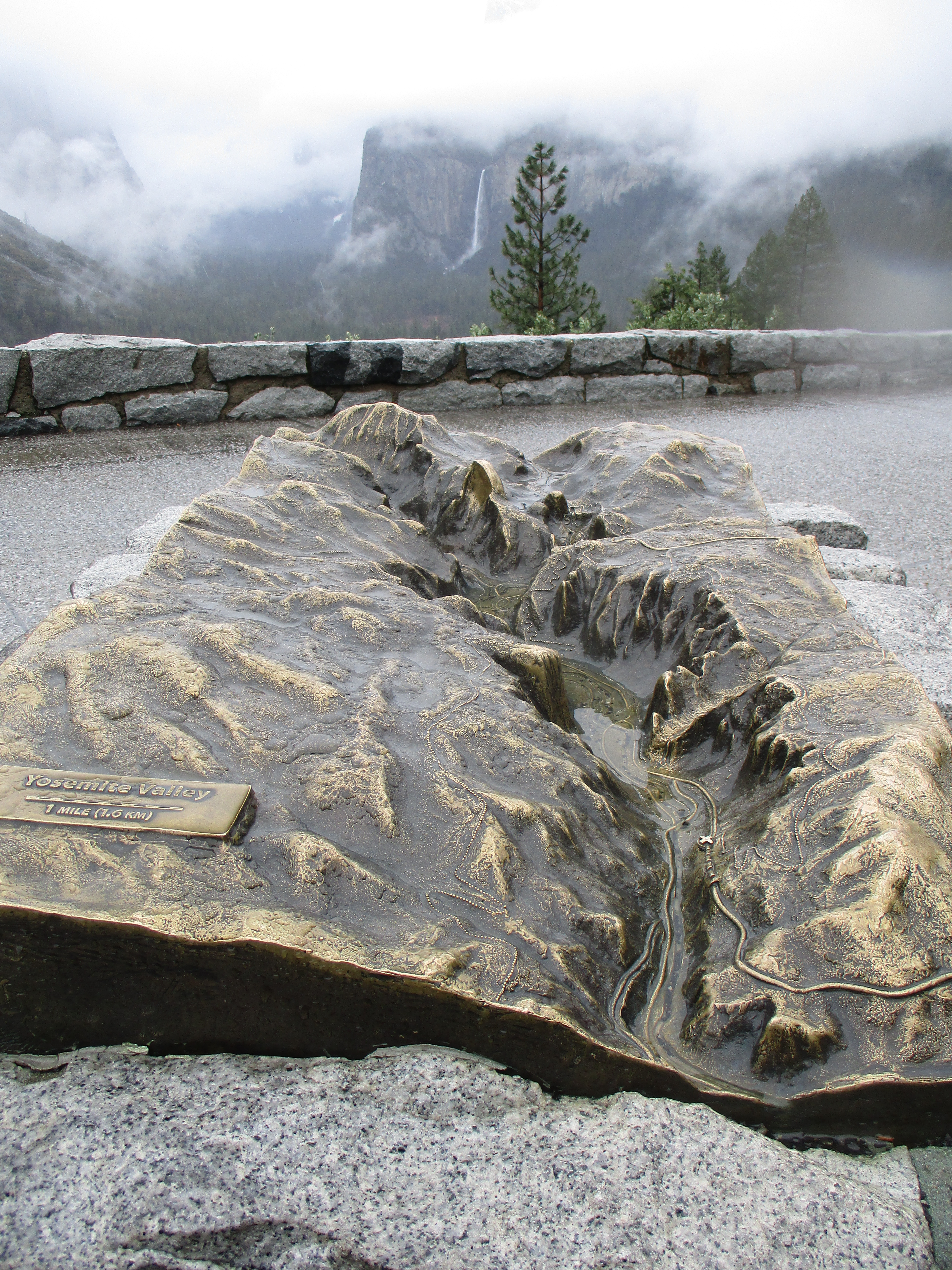 Modell des Yosemite Valley am Parkplatz Tunnel-Blick im Yosemite Nationalpark.